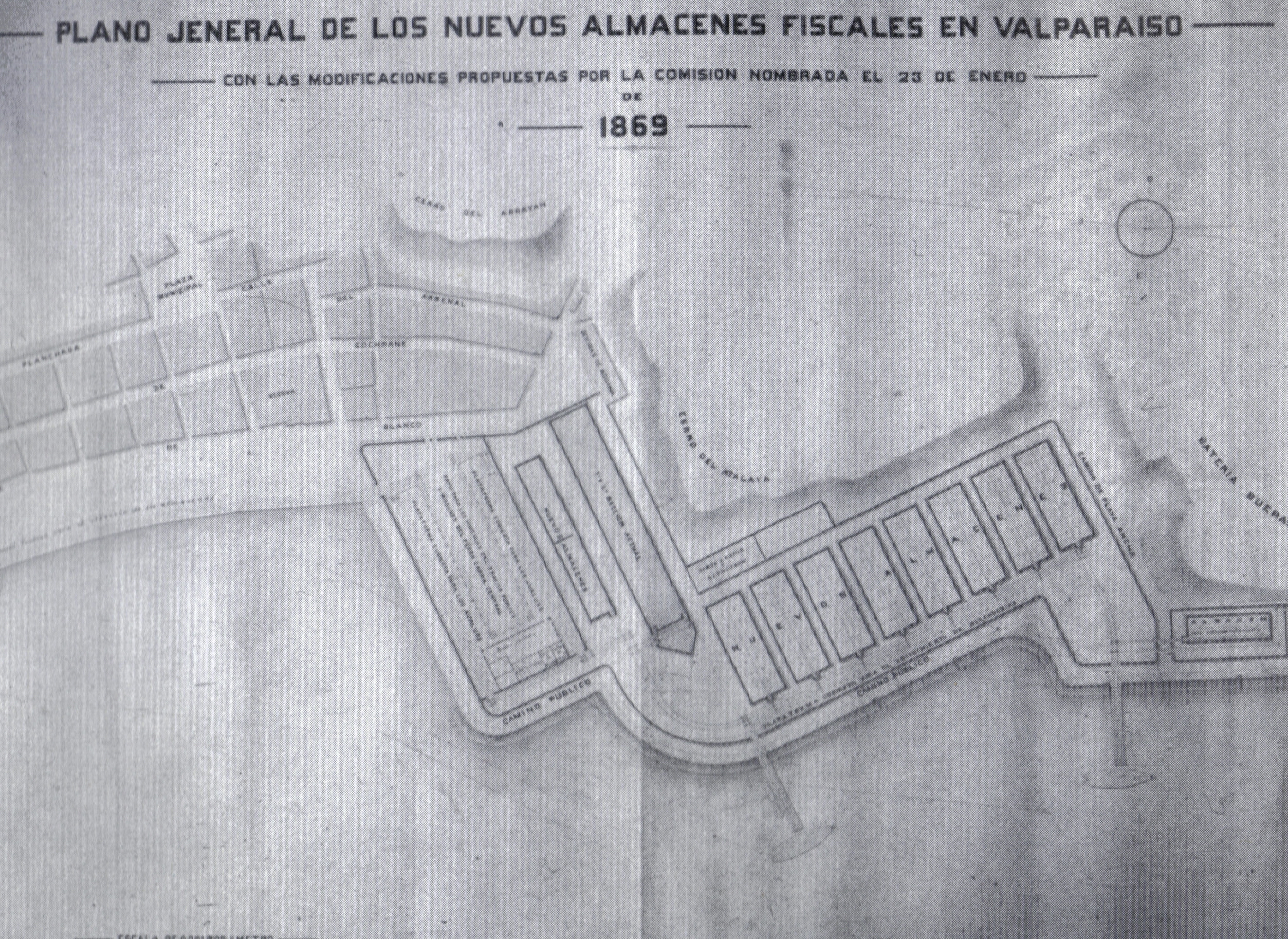 Plano General de los Nuevos Almacenes Fiscales en Valparaíso, creado por el Sr. Manuel Aldunate y posteriormente rechazado por la Comisión nombrada el 23 de enero 1969. Fuente: Memorias de Hacienda 1876.